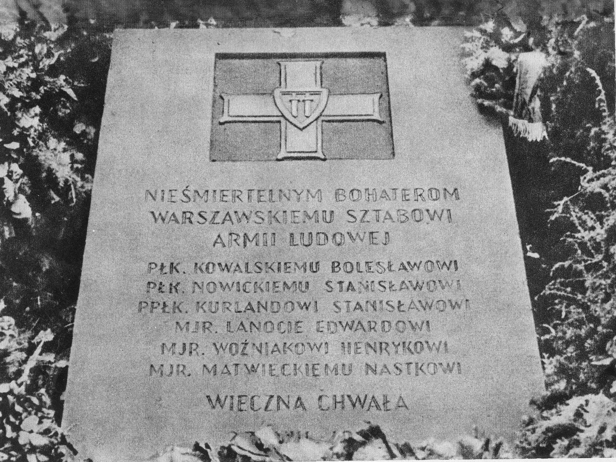 Nieistniejąca płyta pamiątkowa dowódców Armii Ludowej poległych na Starym Mieście na obecnym skwerze Herberta Hoovera